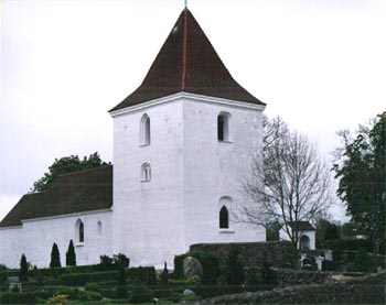 Mårslet Kirke i Ning Herred, Århus Kommune, Denmark